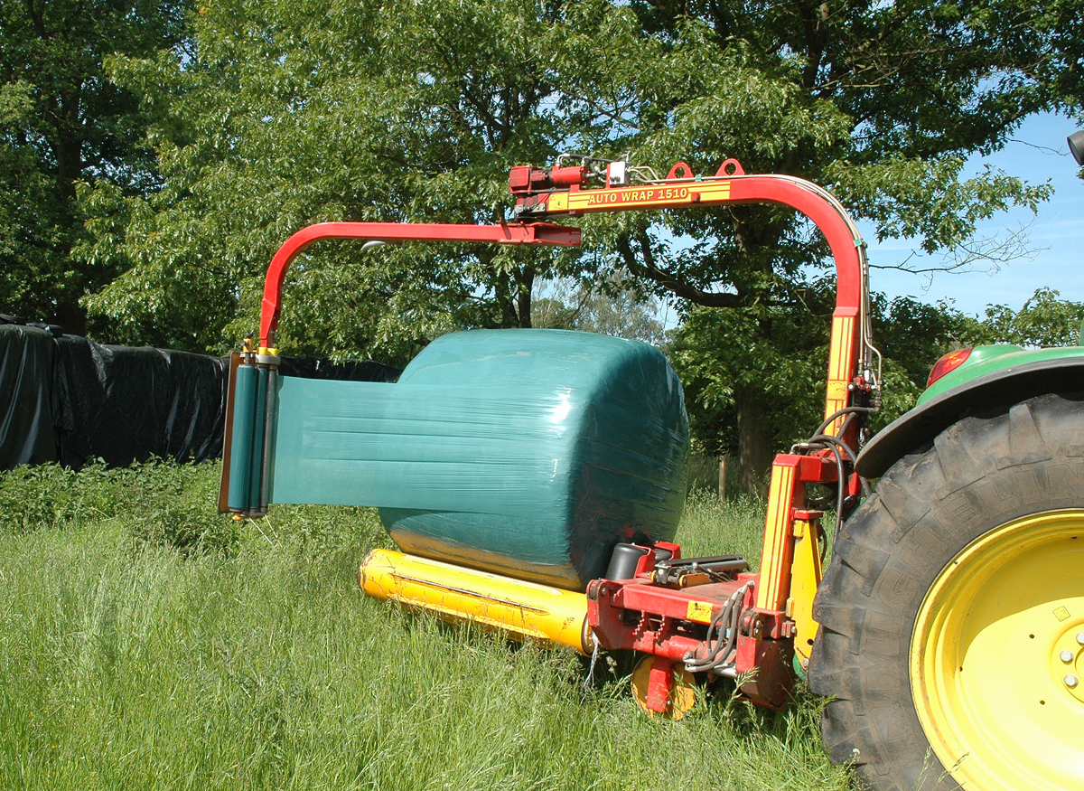 Tanco-Rundballenwickelgerät Auto Wrap 1510 – Die Rundballen werden zur Silage vorbereitet und in Folie eingepackt